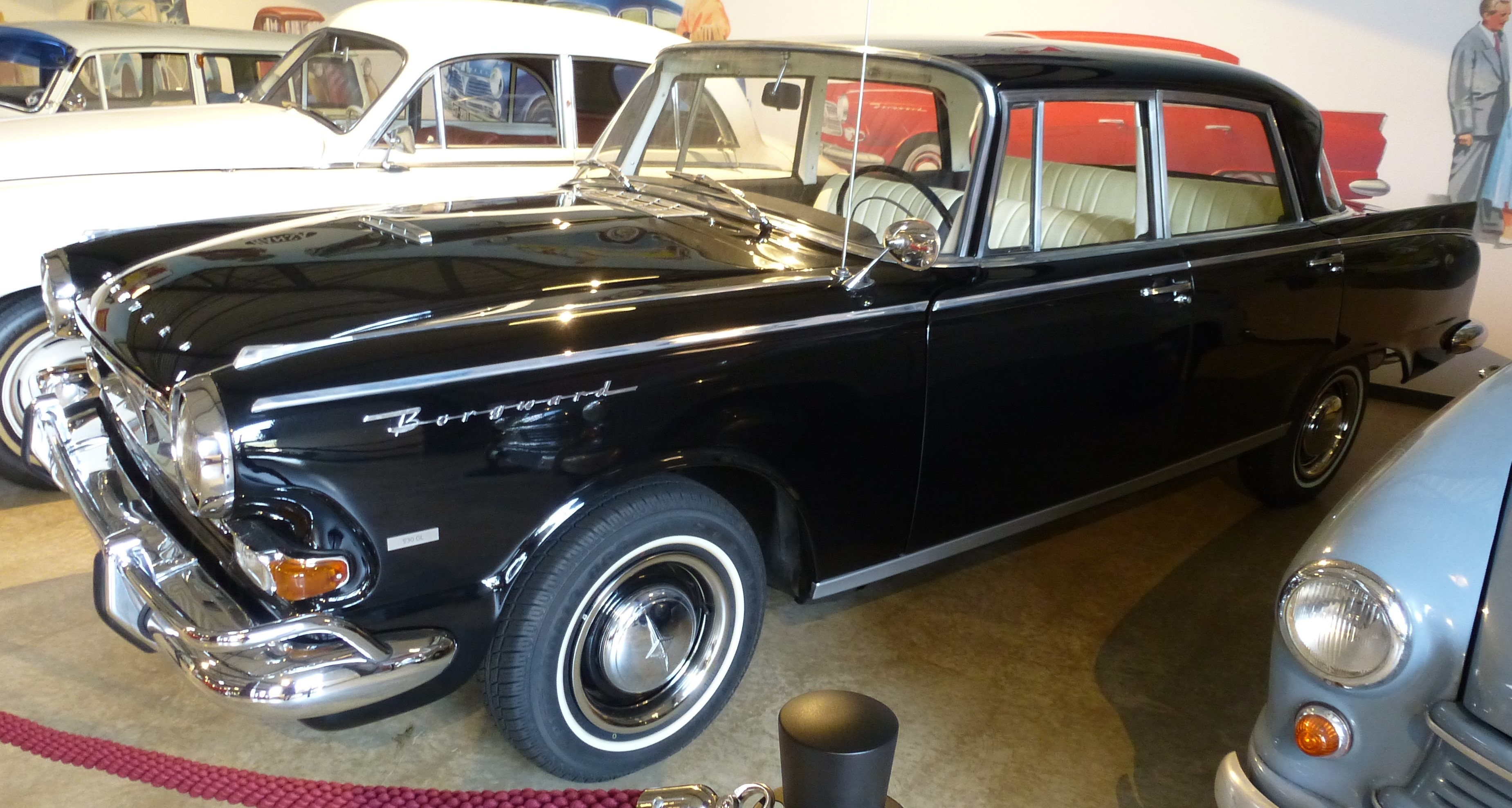 Borgward 230 (aus Mexiko)